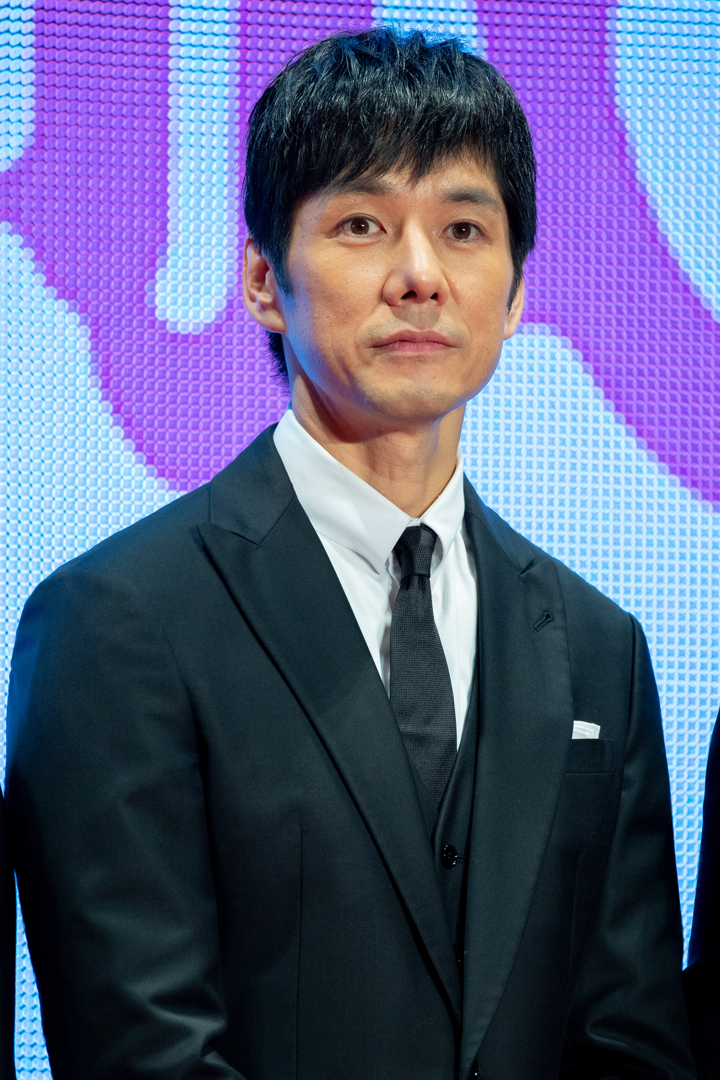 第30回 東京国際映画祭 人魚の眠る家 レッドカーペットイベント 西島秀俊